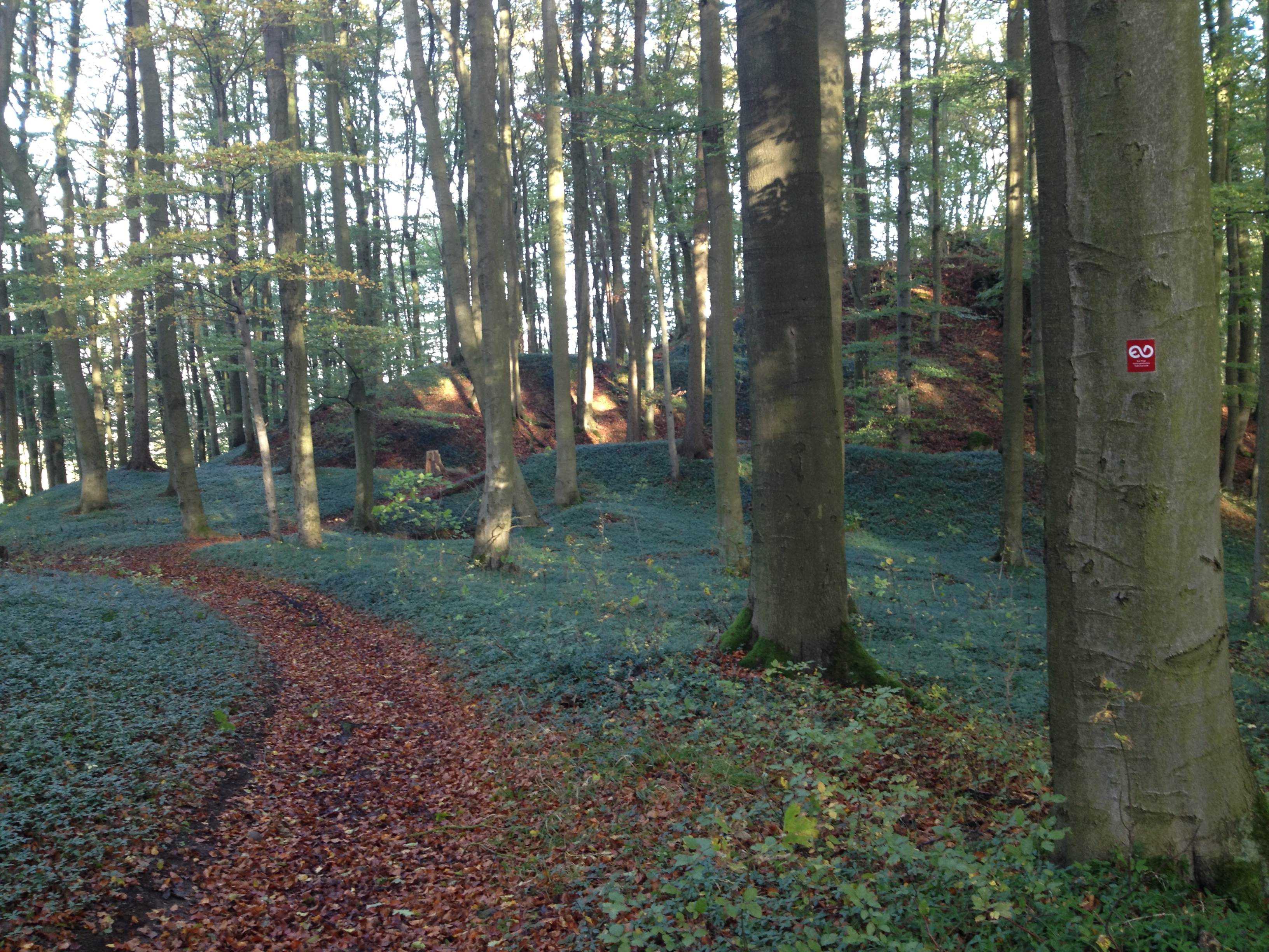 Der Eco Pfad Kulturgeschichte Habichtswald (im Bild Markierung), der Habichtswaldsteig und der Kassel-Steig nahe dem Burgstall der Igelsburg nördlich des Silbersees im Habichtswald